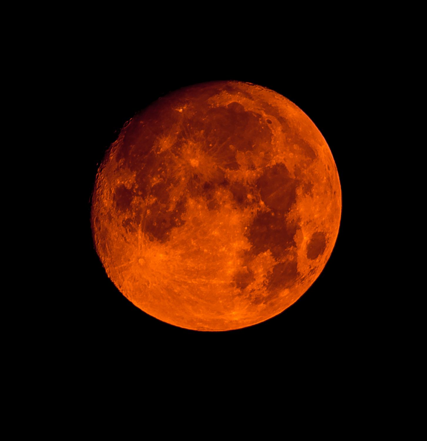 Blodmåne uppstår när solens strålar täcks av jordens skugga. Detta inträffade den 27 juli 2018.